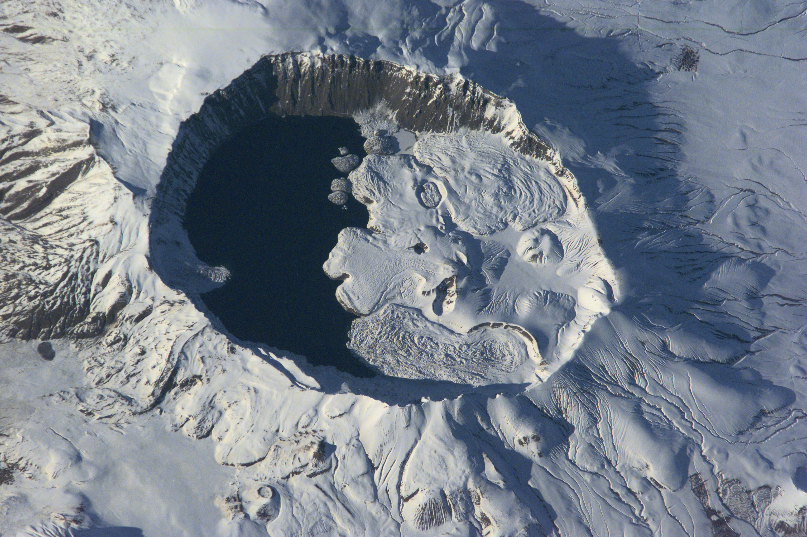 TURKEY/NEMRUT LAKE, CRATER